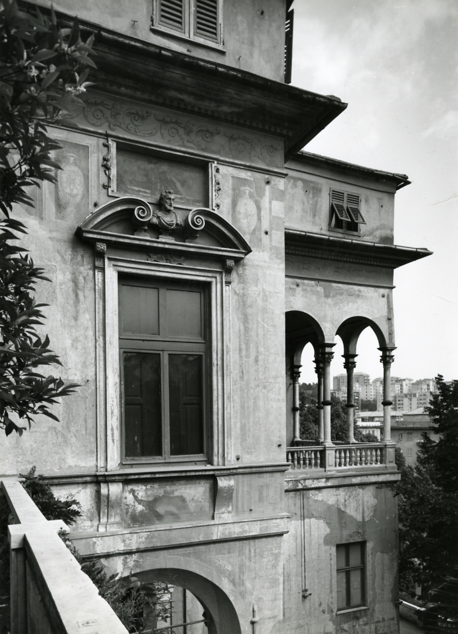 Val Bisagno. Genova. San Fruttuoso (quartiere). Villa Imperiale, ora del Comune. Biblioteca. Esterni]. Servizio fotografico : Genova, 1963 / Paolo Monti. - Stampe: 3 : Positivo b/n, gelatina bromuro d'argento/ carta, 24x30. - ((Al verso delle stampe manoscritti i numeri dei negativi corrispondenti: 6231, 6233, 7024; timbri a inchiostro con data e copyright: "© 1963 - Credit to/ Paolo Monti/ Foto Studio 22/ Corso Sempione [...]/ Milano [...]". - Sul coperchio della scatola iscrizione didascalica manoscritta a pennarello nero: "Genova/ Bologna". - Il negativo identificato con il numero 46397 è stato realizzato per Zodiac. - Occasione: Documentazione per la pubblicazione: Italia Nostra (a cura di), "Le ville genovesi", catalogo della mostra, Genova 1962, Genova, Comune di Genova, 1967. - Fonte: Monografia di Italia Nostra (a cura di): Le ville genovesi, catalogo della mostra, Genova 1962, Genova, Comune di Genova (1967). - Fonte: Lettera di Paolo Monti: I. Carteggi/ Genova - Enrico (1963-1966), presso Archivio Paolo Monti. Camicia con documenti dattiloscritti e manoscritti vari relativi al lavoro eseguito per Italia Nostra: preventivi, lettere, inventari. - Fonte: Rubrica di Paolo Monti: Archivio fino 1-4-1961/ 31-3-1963 (1961-1963), presso Archivio Paolo Monti. - Fonte: Agenda di Paolo Monti: R 1 - Monti/ 1 aprile 1963 - 6 giugno 1964/ 6000-8193 (1963-1964), presso Archivio Paolo Monti